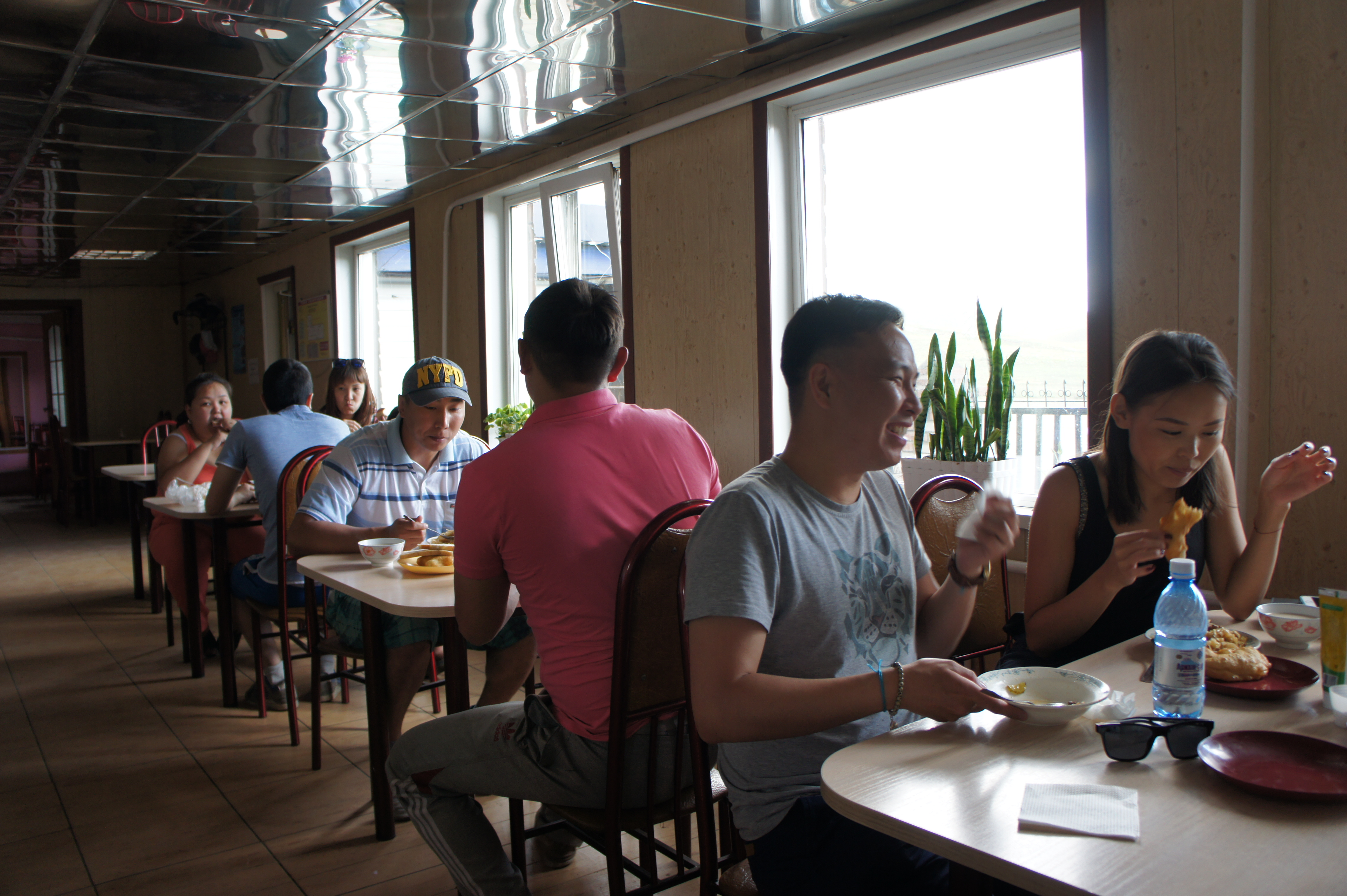 сай хонаш посетители